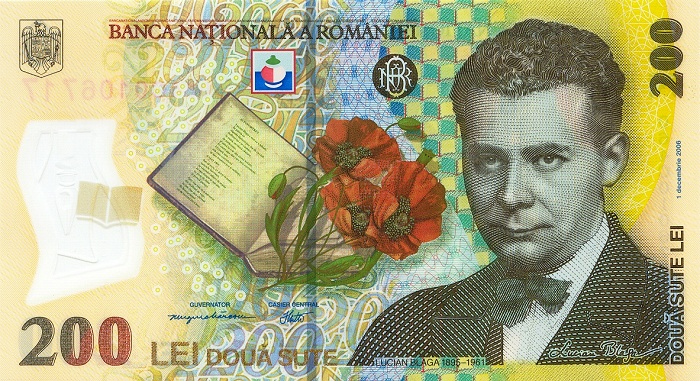 200 Leu anverse